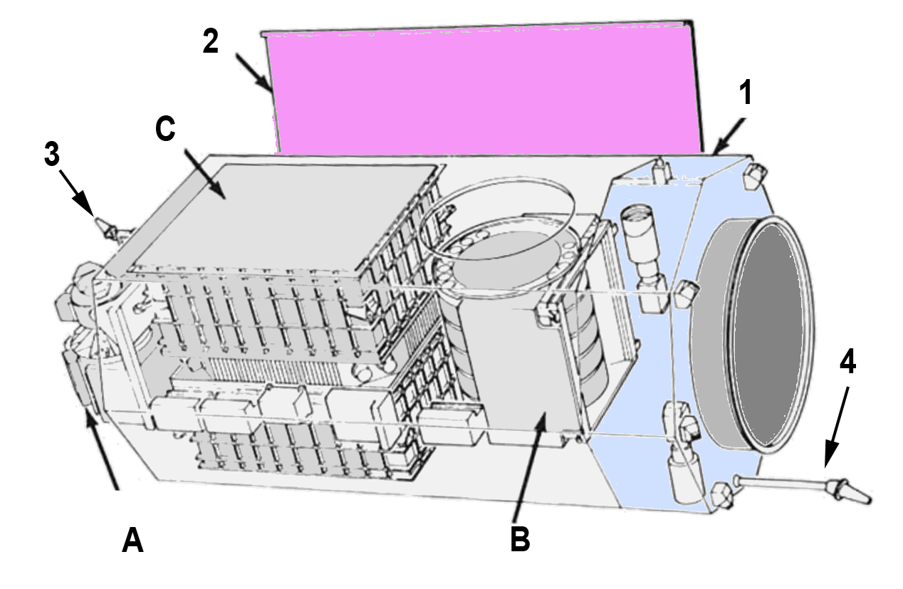 Schéma de l'observatoire spatial HEAO-3 de la NASA